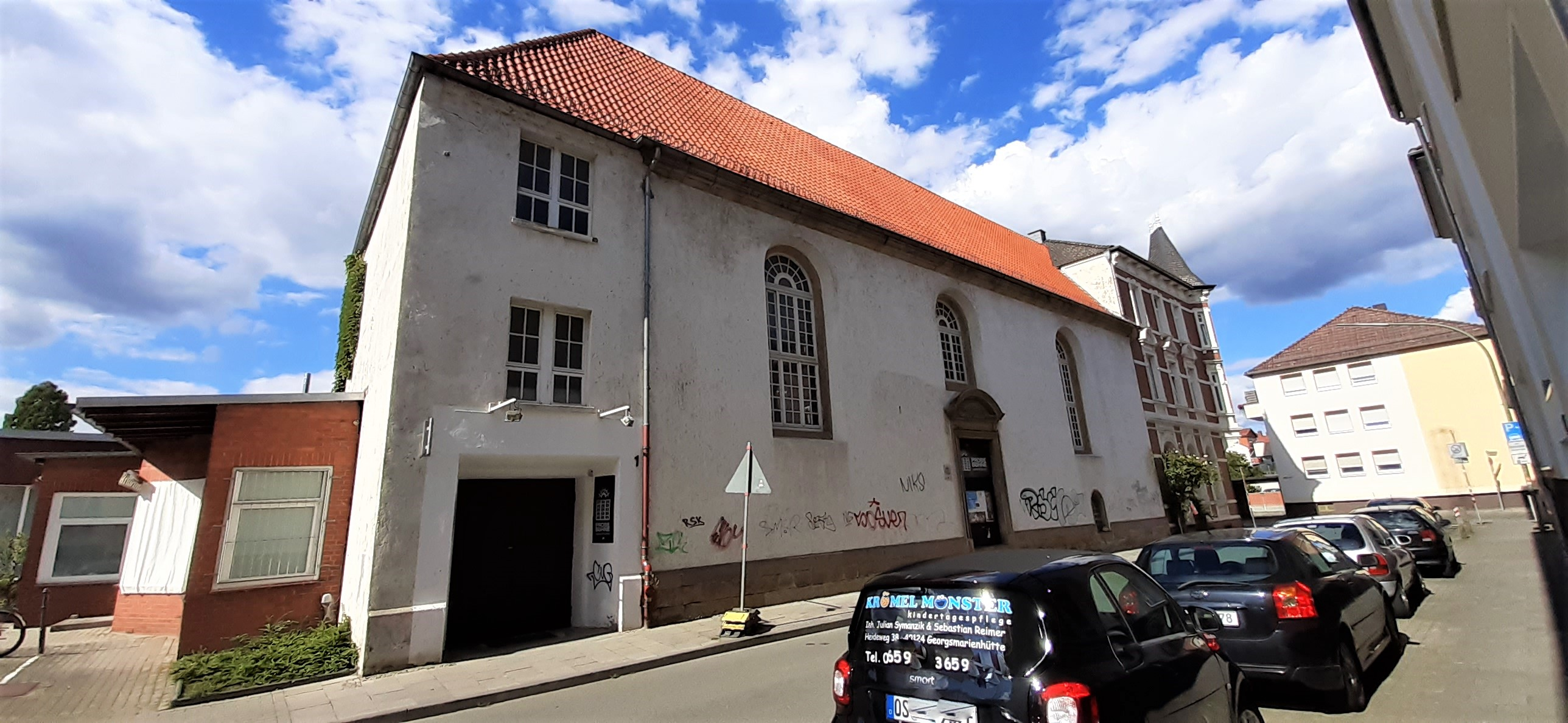 Ehemalige Komtureikirche Osnabrück. Später Tanzsaal und Lager, heute Amateurtheater „Probebühne“.